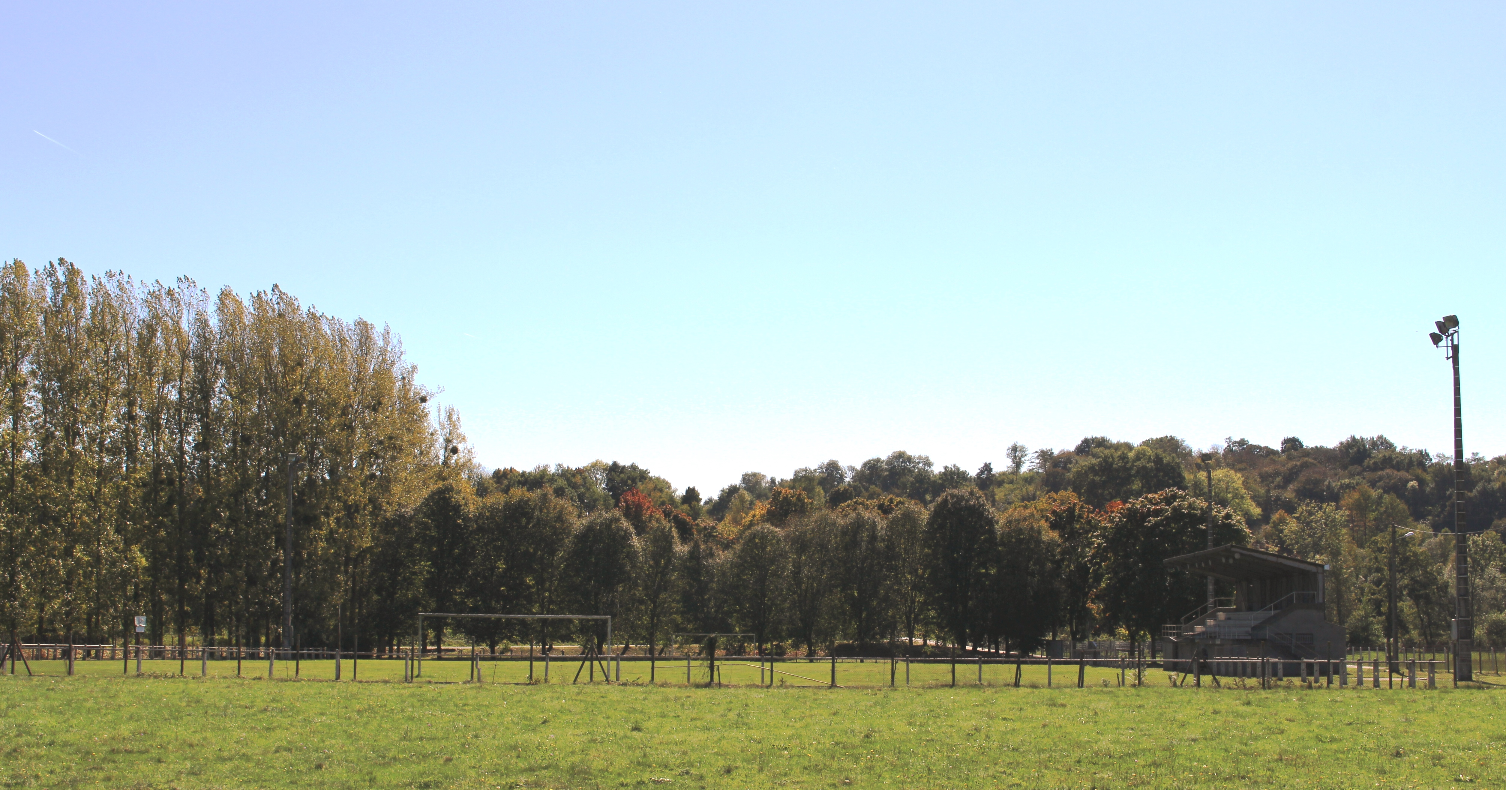 Stade de football de Mazères-de-Neste (Hautes-Pyrénées)